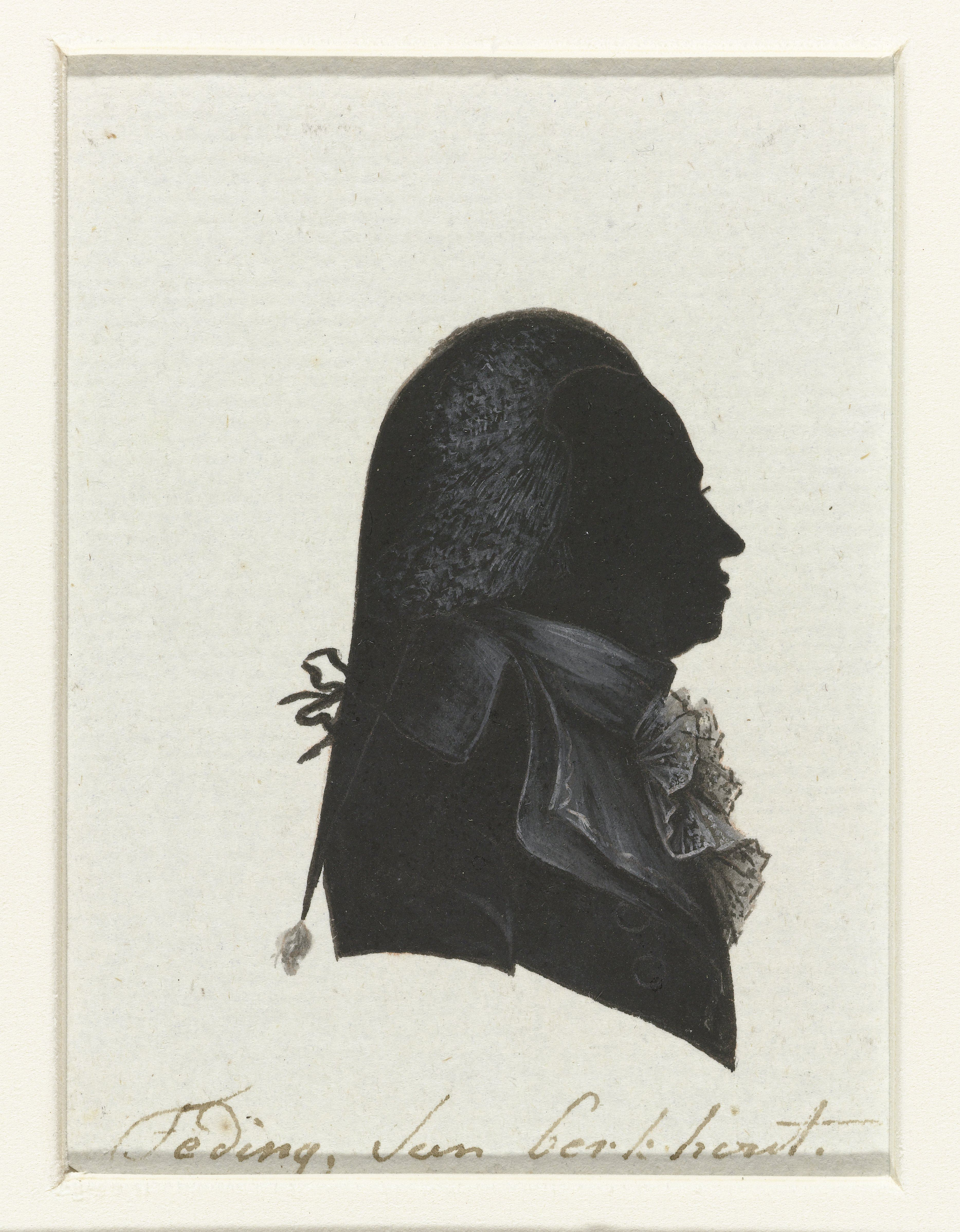 W.H. Teding van Berkhout. Tekening in Oost-Indische inkt, waarschijnlijk gemaakt door Hausdorff. De tekening behoort tot een serie van portretten van afgevaardigden naar de Eerste Nationale Vergadering in 1796-1797. Van de serie werden gravures gemaakt die zijn afgedrukt in "Geschiedenis der staatsregeling, voor het Bataafsche volk", een boek van Cornelius Rogge (1799).